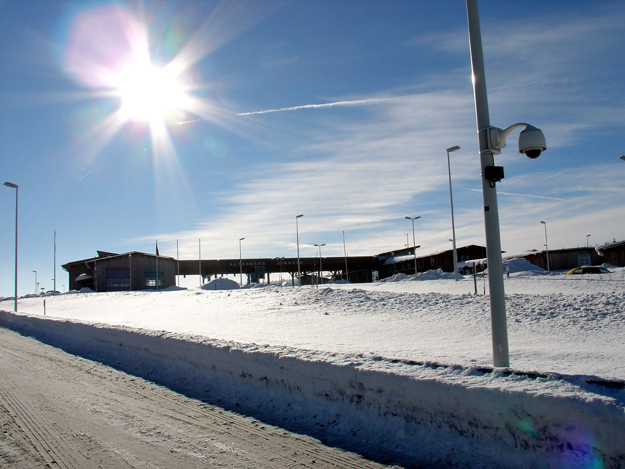 Zinnwald (Erzgebirge), neues Zollamt Altenberg - Cinovec, Blick zur PKW Ein- und Ausreise